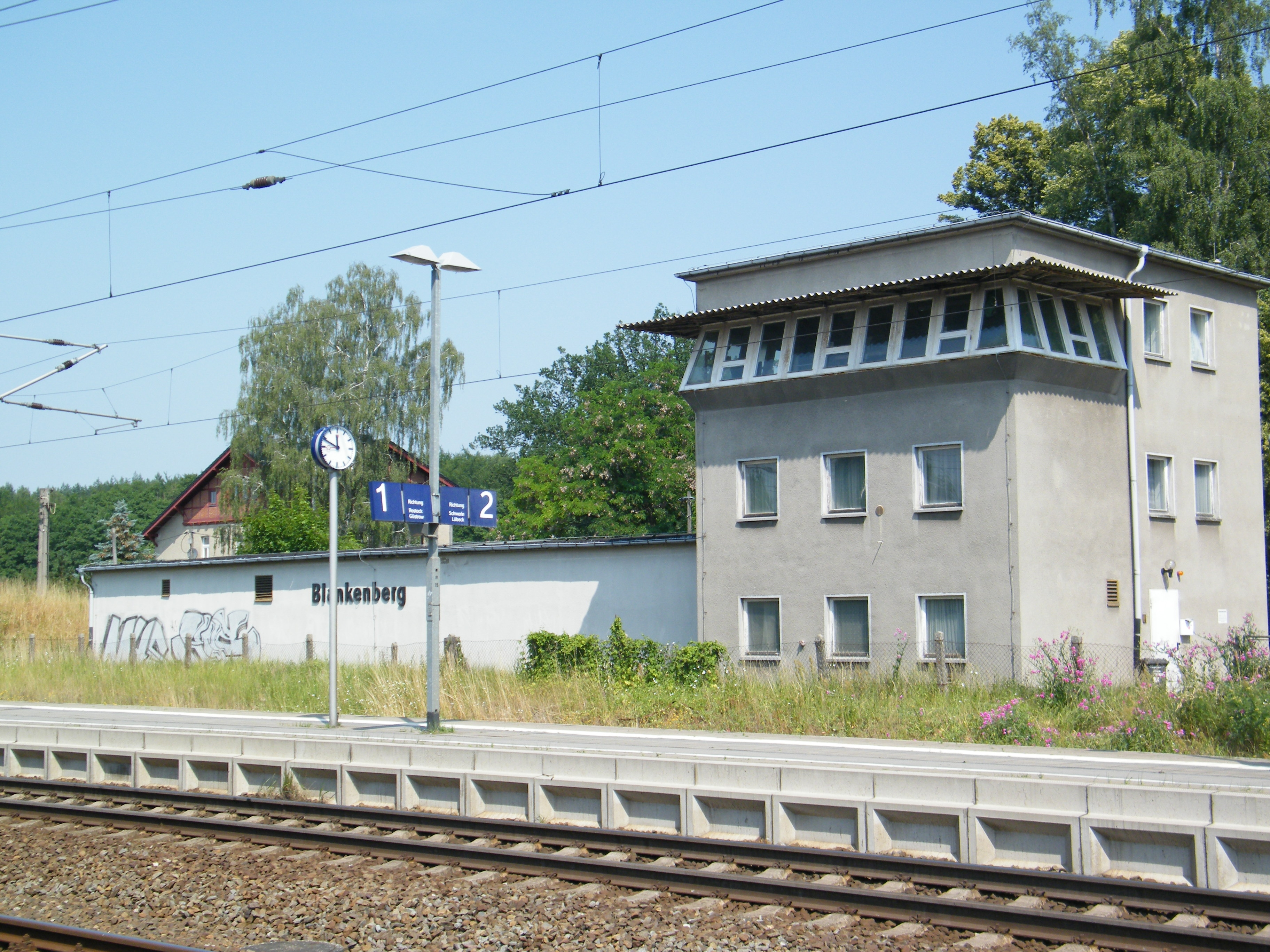 Bahnhof Blankenberg (Meckl), Bahnsteig in Richtung Bad Kleinen mit Stellwerk